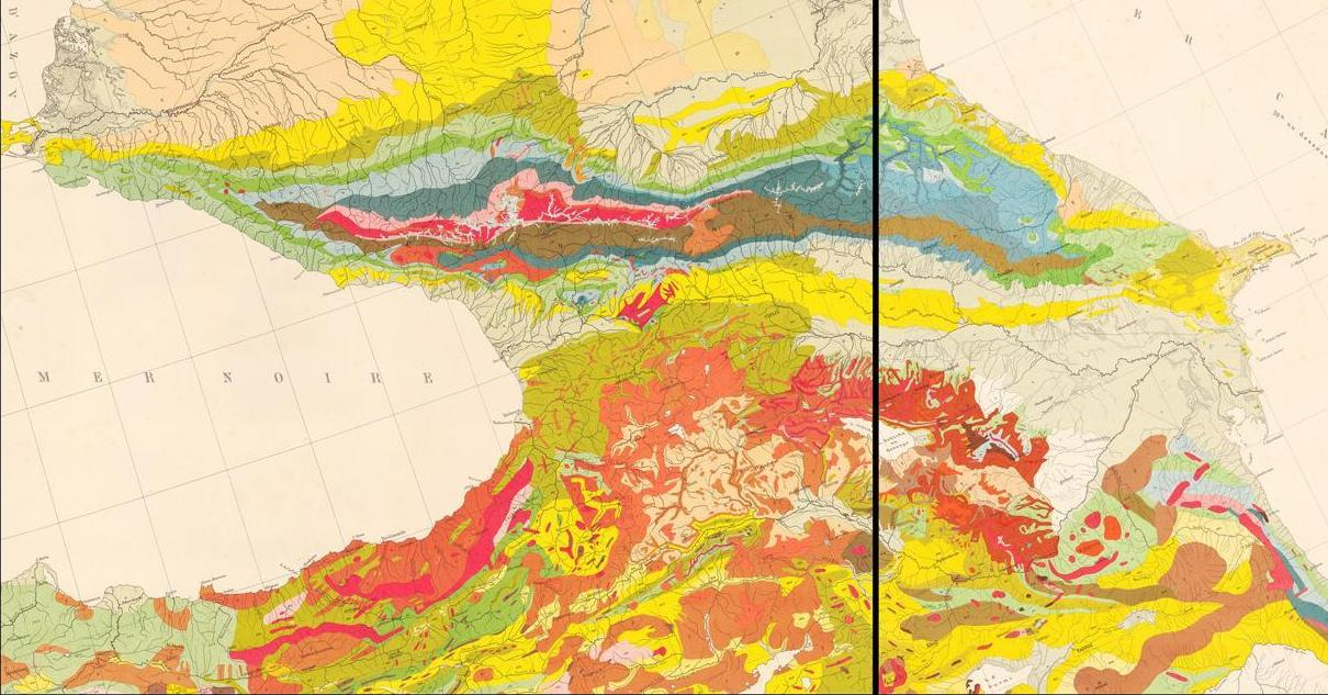 Carte géologique internationale de l'Europe